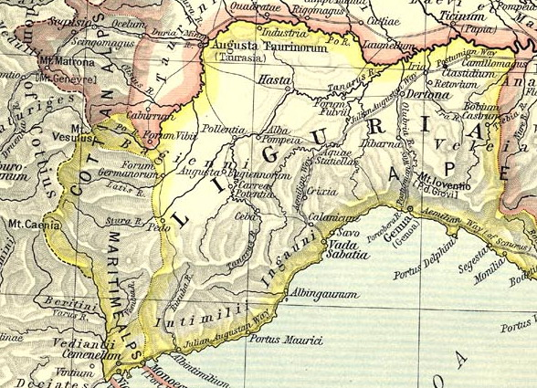 Regione Liguria Augustea Particolare tratto da :Immagine:Shepherd-c-026-027.jpg